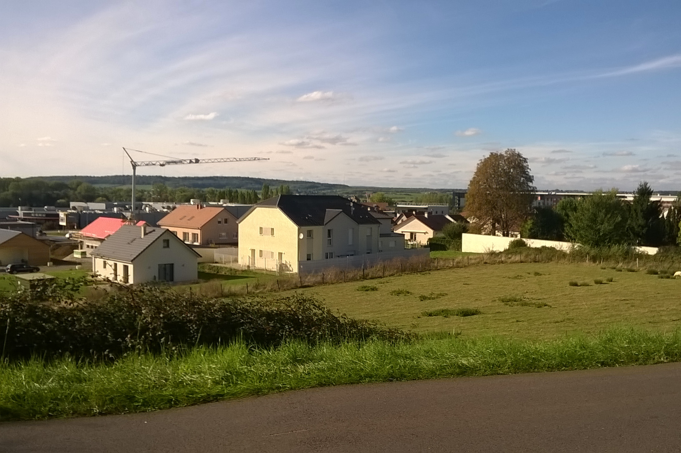 Le quartier Les Haberges - Vesoul